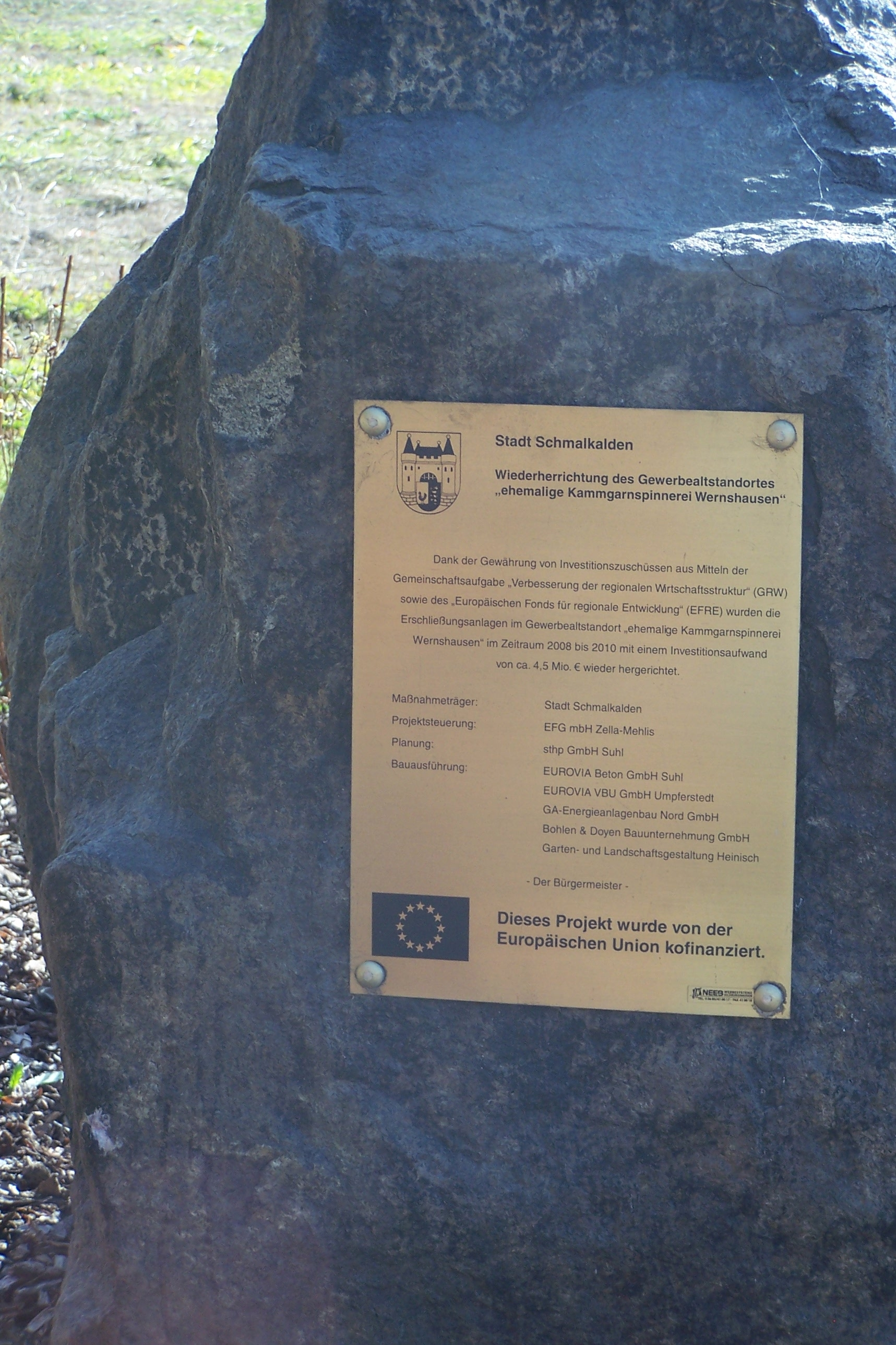 Ein Denkmal für den mit EU-Fördermitteln subventionierten Abriß eines Industriedenkmals in Niederschmalkalden.